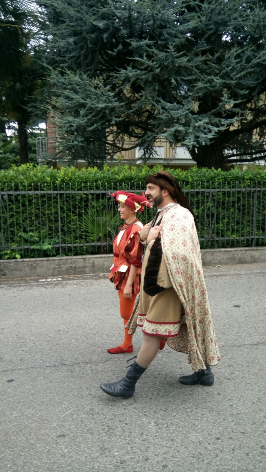 Menestrello e giullare del Palio dei Castelli di Castiglione Olona edizione 2017